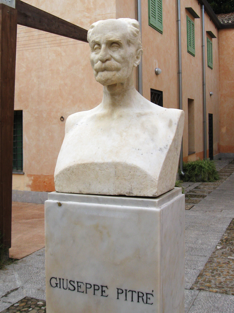 Busto raffigurante Giuseppe Pitrè